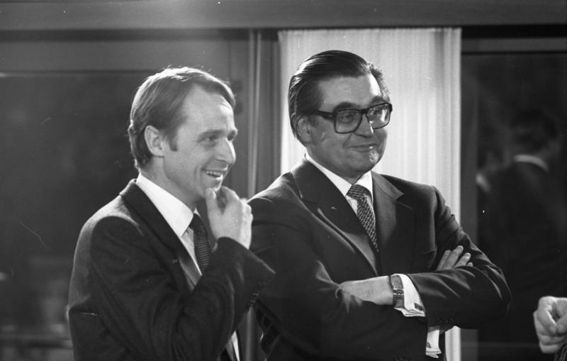 Bundeskanzler Helmut Schmidt empfängt die Ministerpräsidenten der Länder im Bundeskanzleramt.